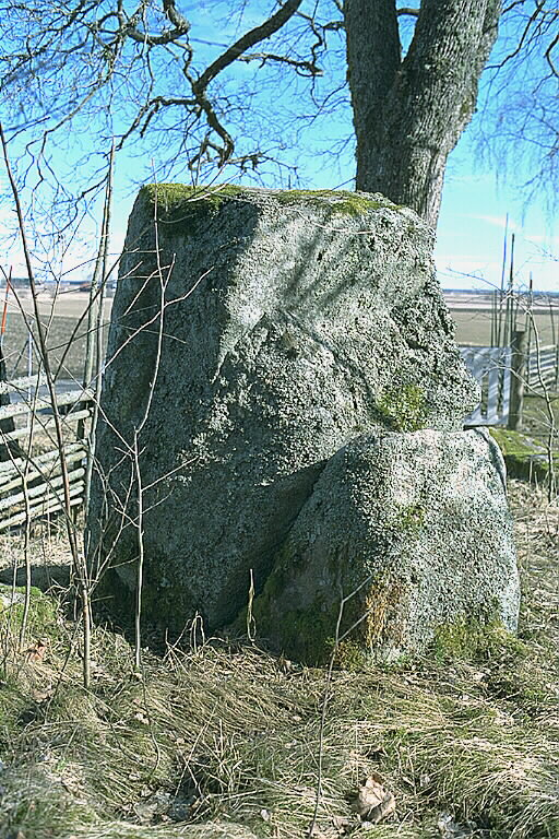 Baksidan av runstenen U914. Motiv: U914 Ströja Nyckelord: Runor Kategori: Runristning/runsten Baksidan av runstenen U914.